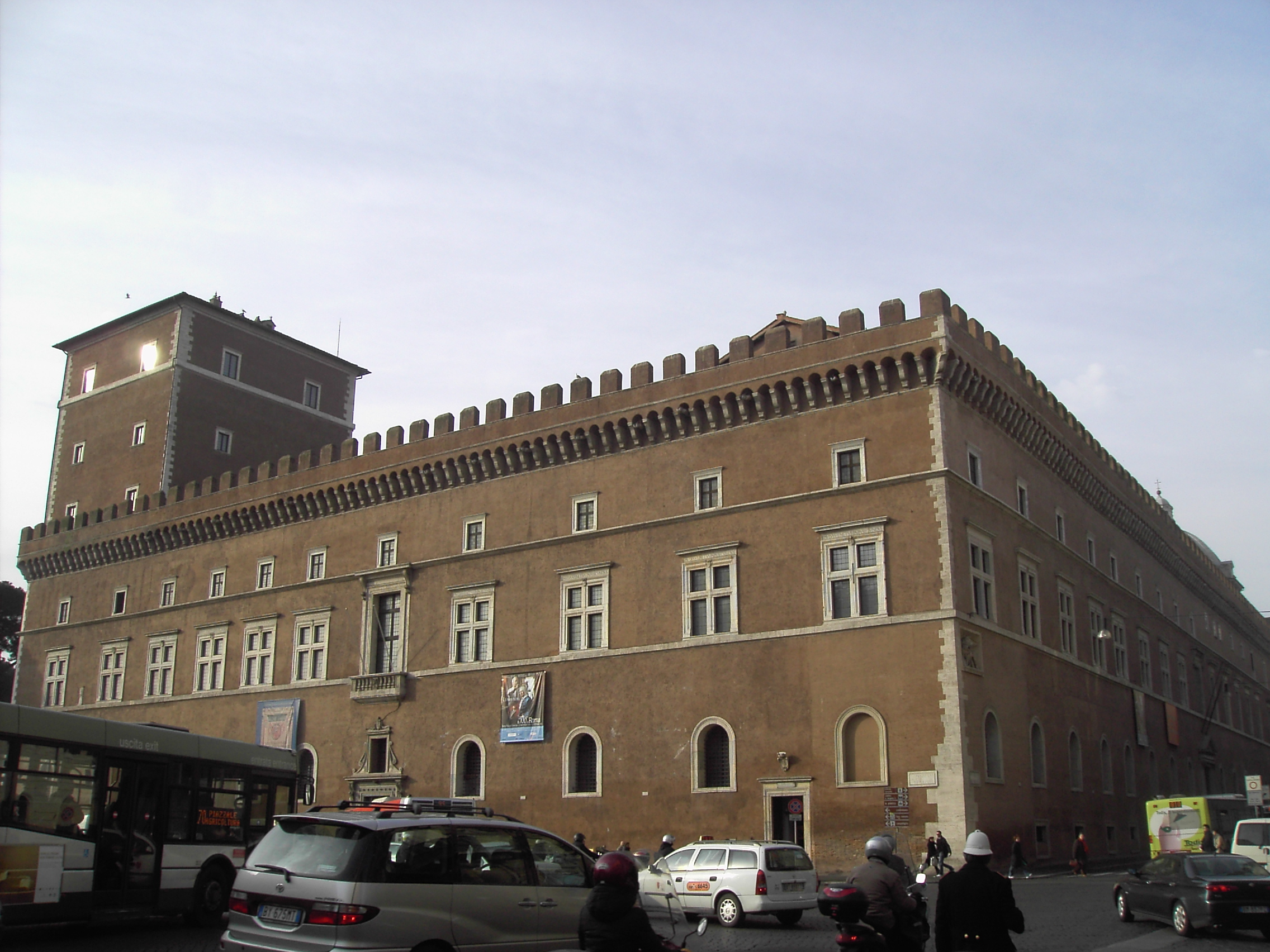 Roma, Palazzo Venezia